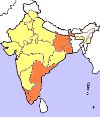 Lok Sabha 1996. Gjord av Soman.